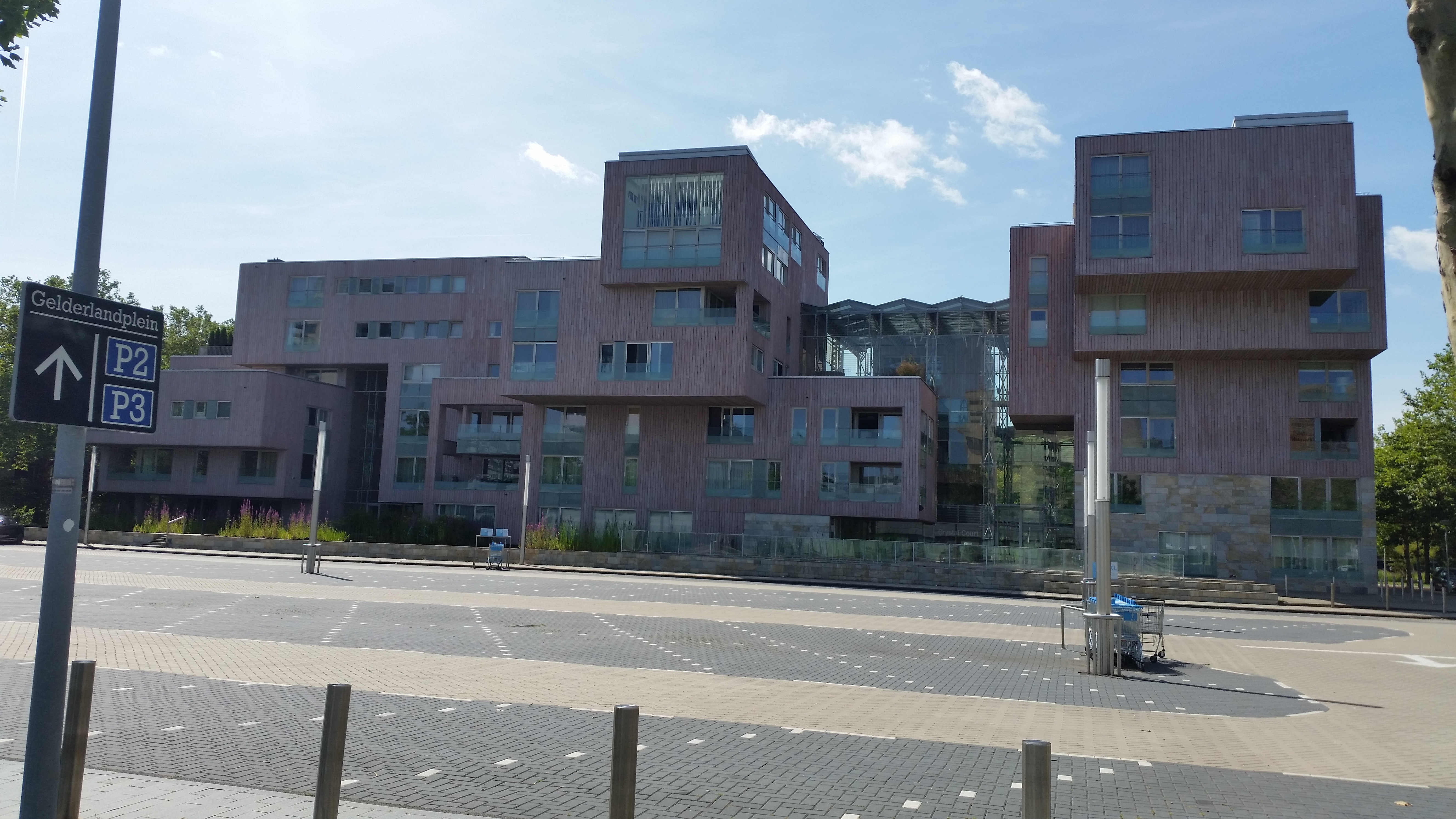 Crystal Court, Amsterdam; voorgevel